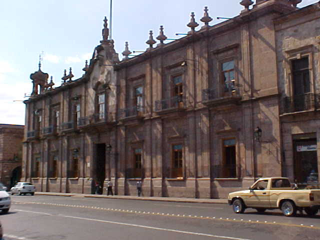 Palacio de Gobierno de Michoacán, en Morelia (Michoacán's Government Palace in Morelia)